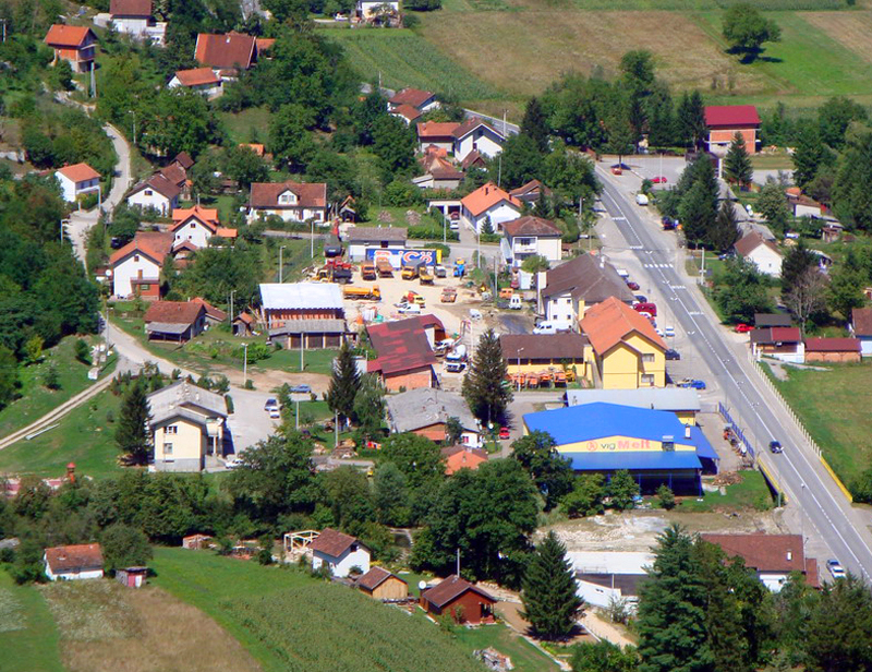 Крупа на Врбасу